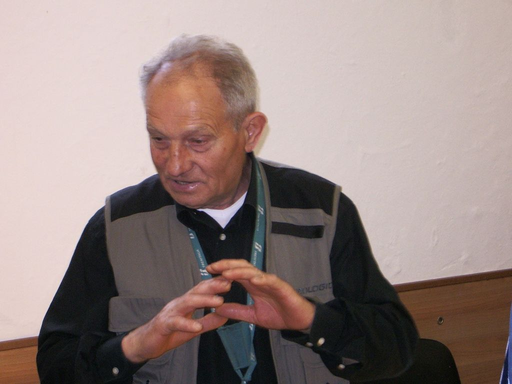 Ezio Gallori